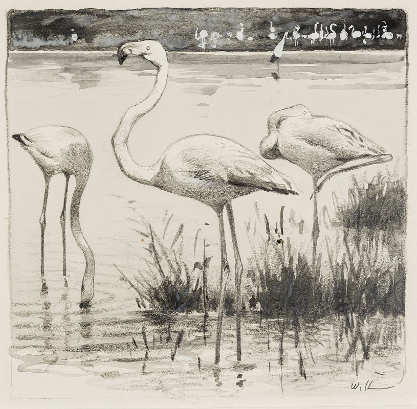 Wilhelm Kuhnert: Flamingos. Bleistift, Tusche und Deckweiß auf Papier, 15 x 15,5 cm, rechts unten signiert